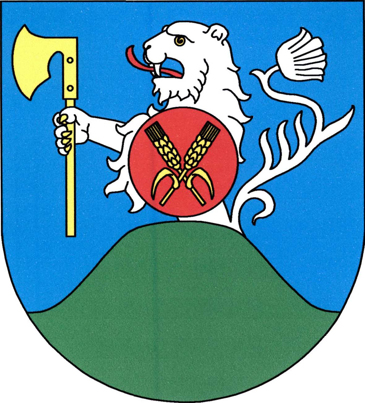 Znak obce Chraberce